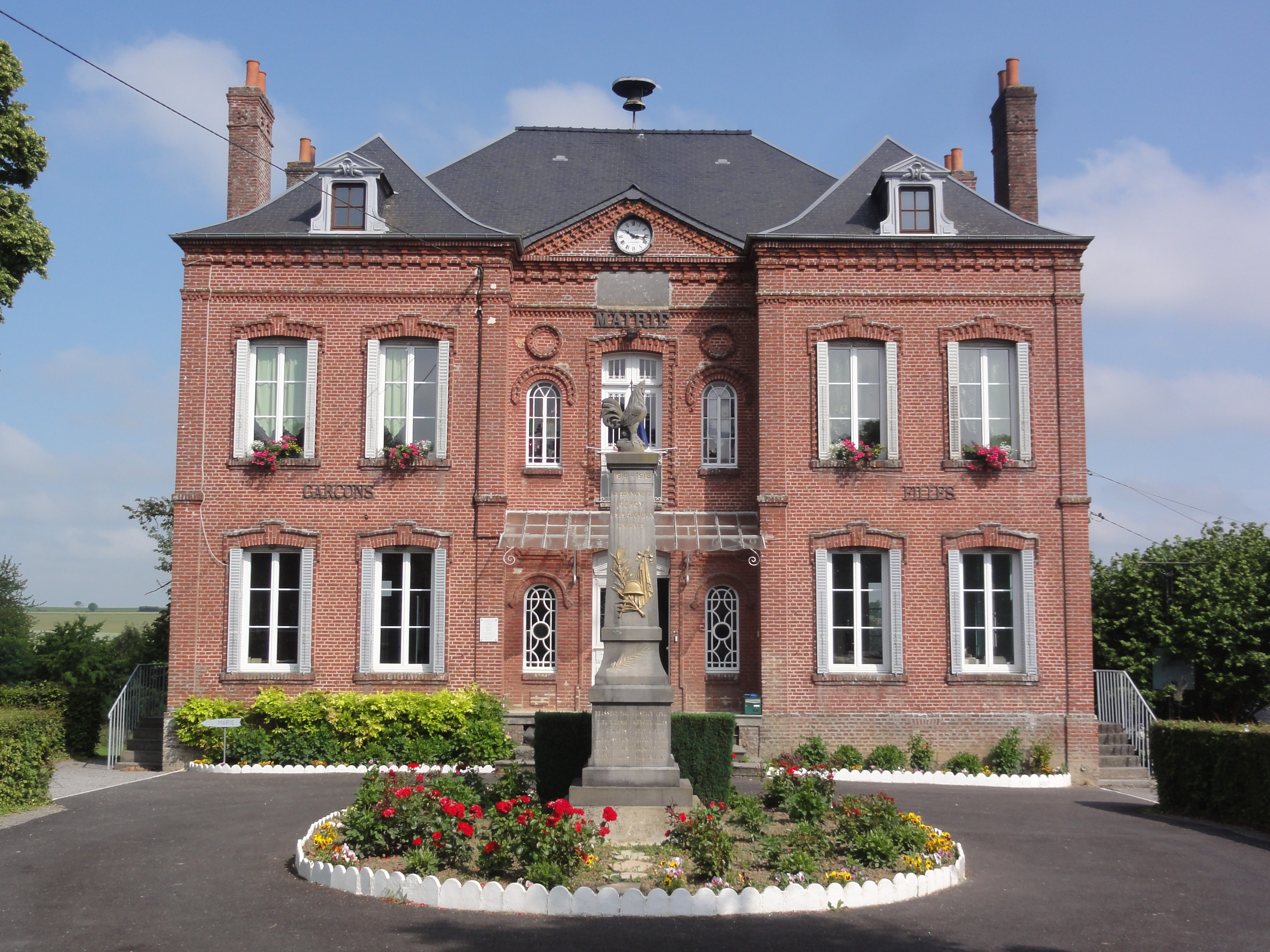 Gercy (Aisne) mairie